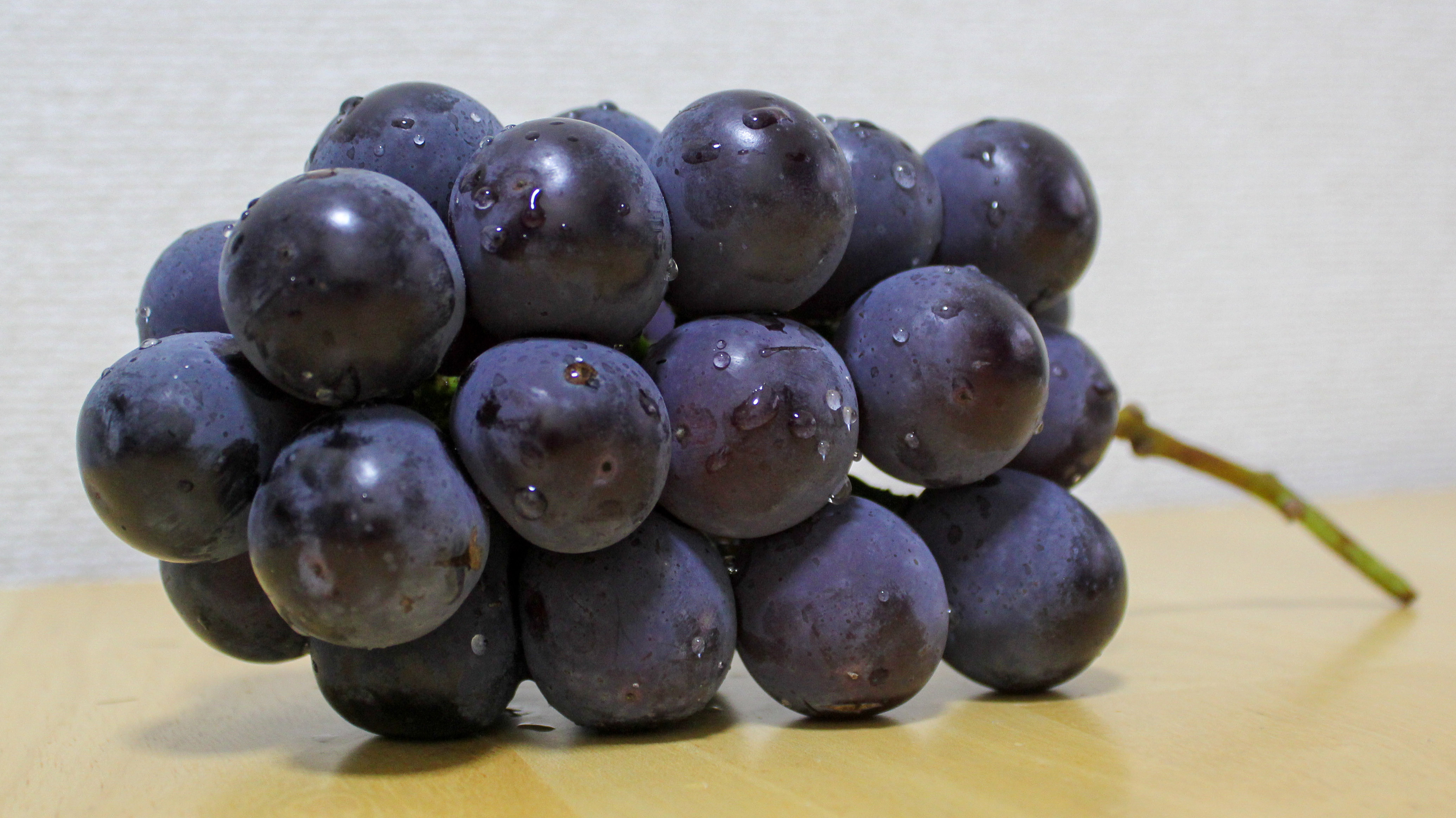 巨峰 2015年撮影